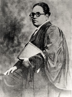 डॉ॰ बाबासाहेब आंबेडकर